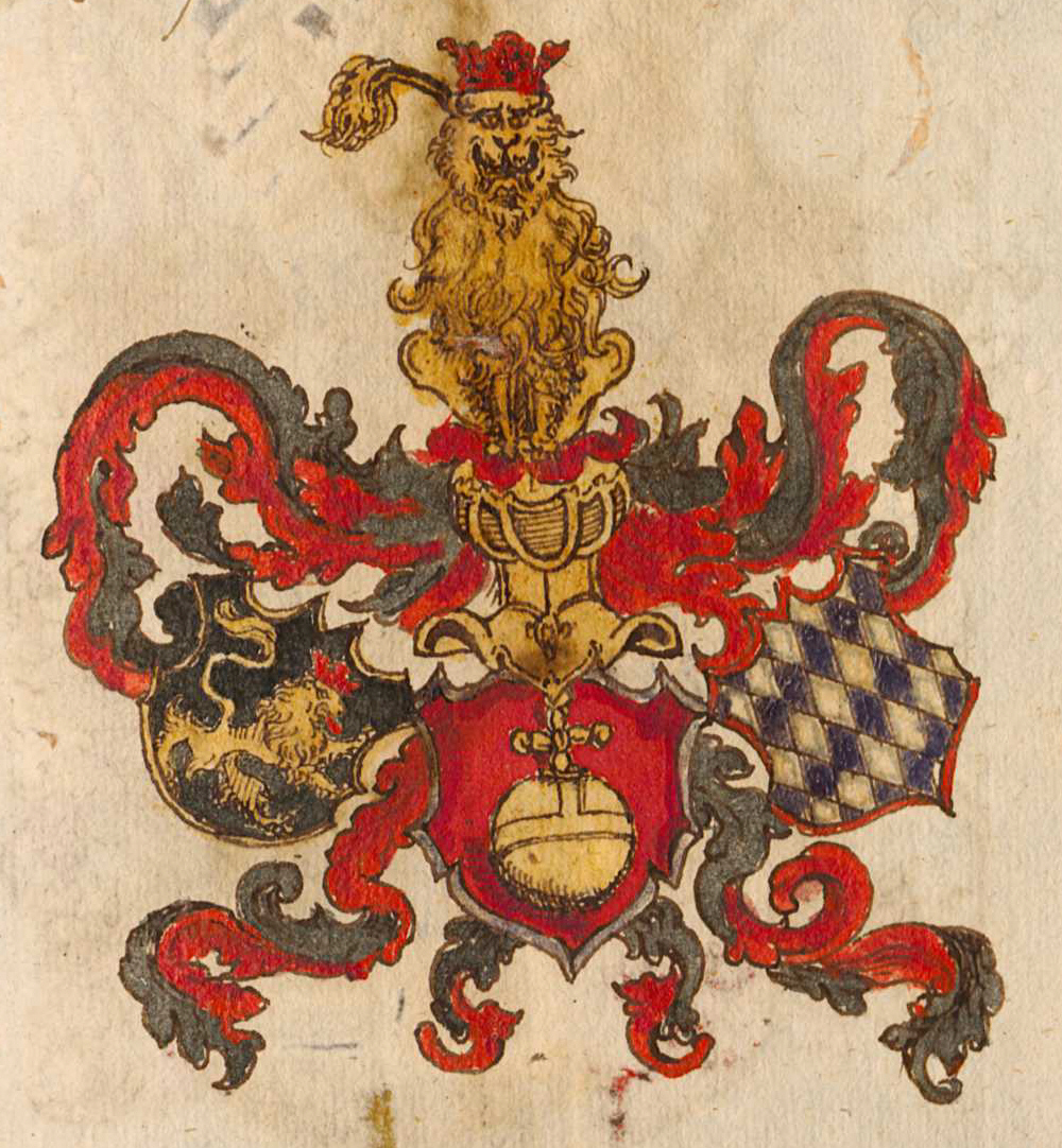 Wappen Friedrich IV., Kurfürst von der Pfalz („Churfürst Fridrichen von Heidelberg“)